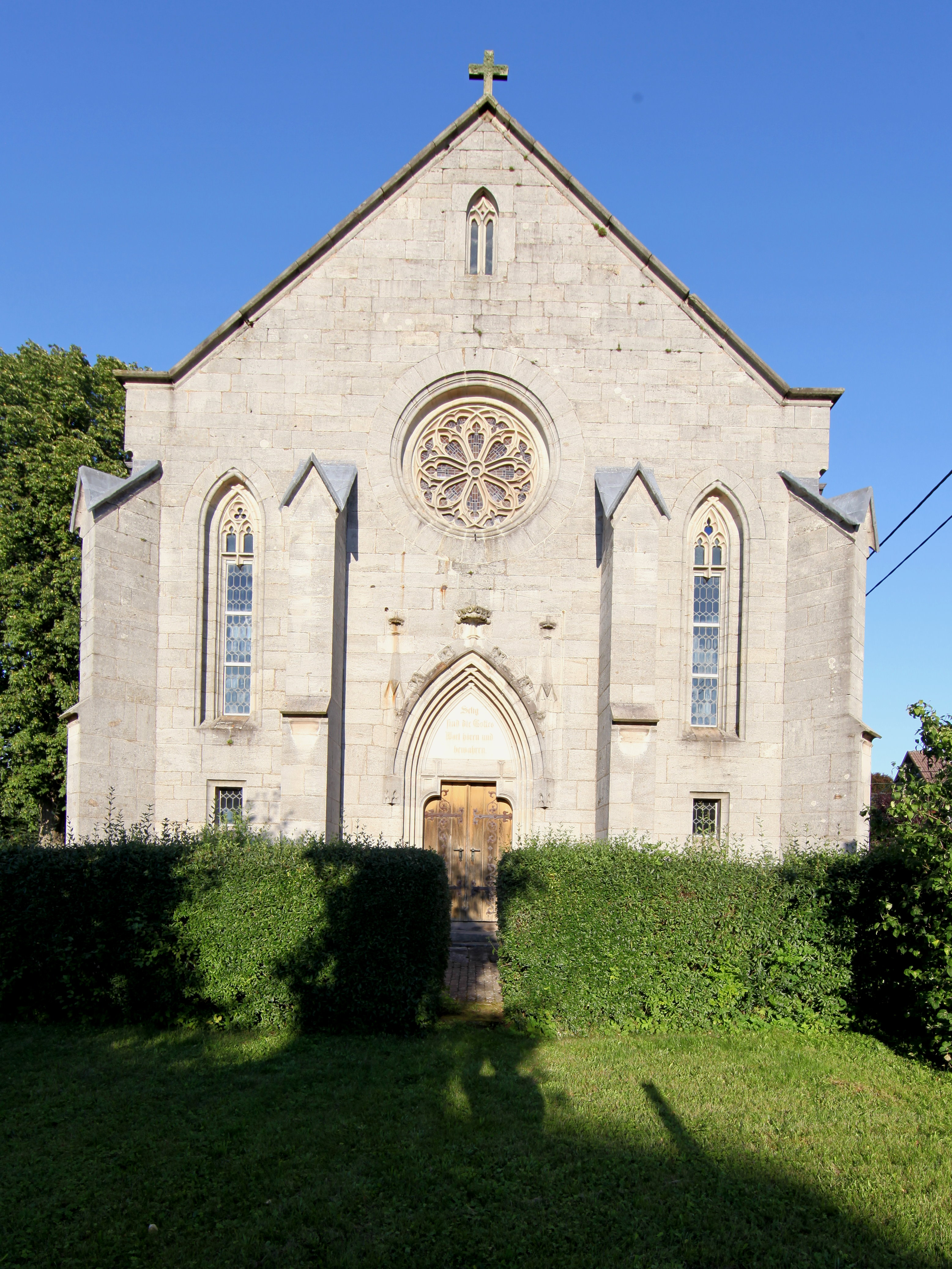 evangelisch-lutherische Kirche St. Marien in Poppenhausen